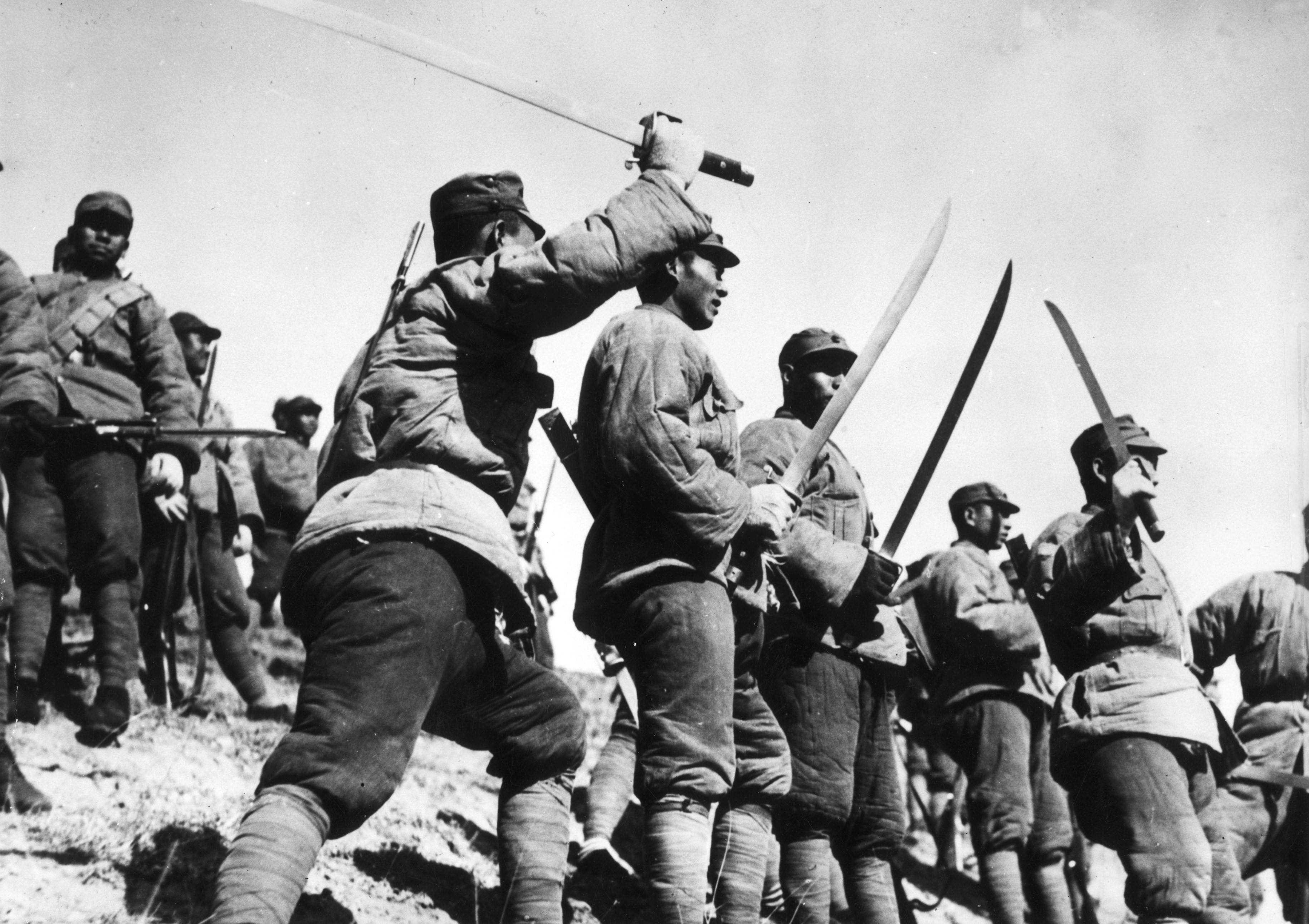 中國大刀隊。